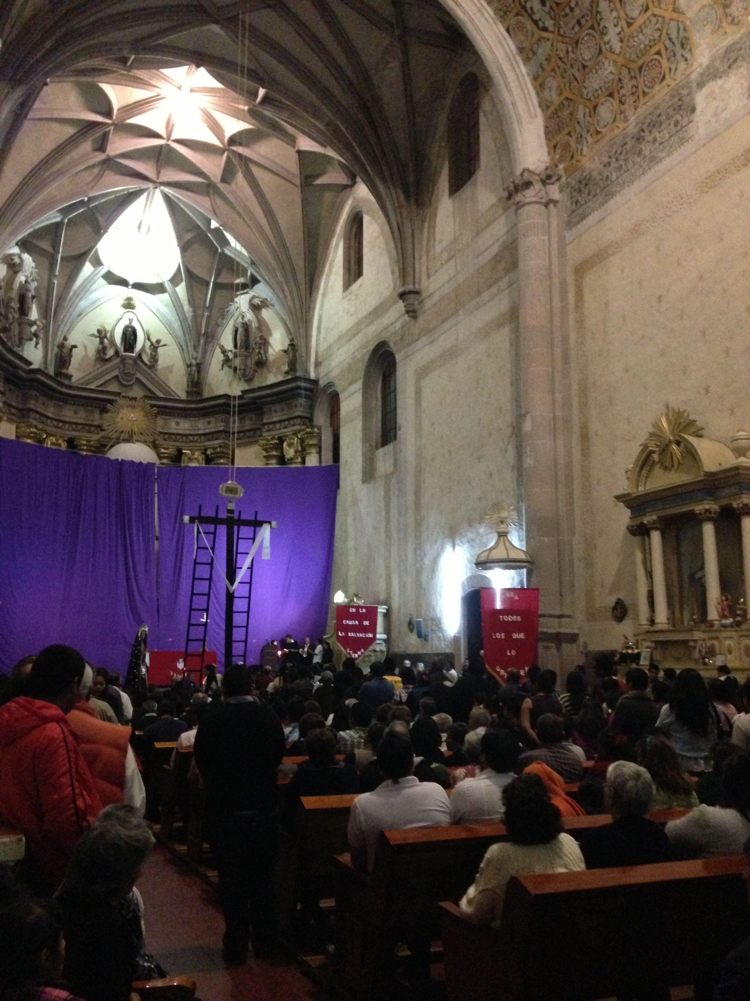 Personas tomando la comunión en Actopan Hidalgo durante la celebración de Semana Santa.